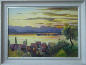 Heinrich Hauber: Radolfzeller See 1961 , Oel auf Leinwand